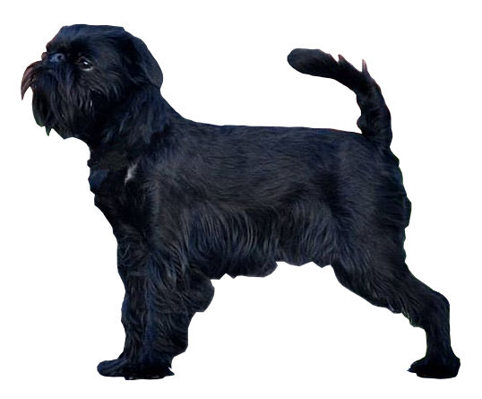 Griffon belge sur fond blanc